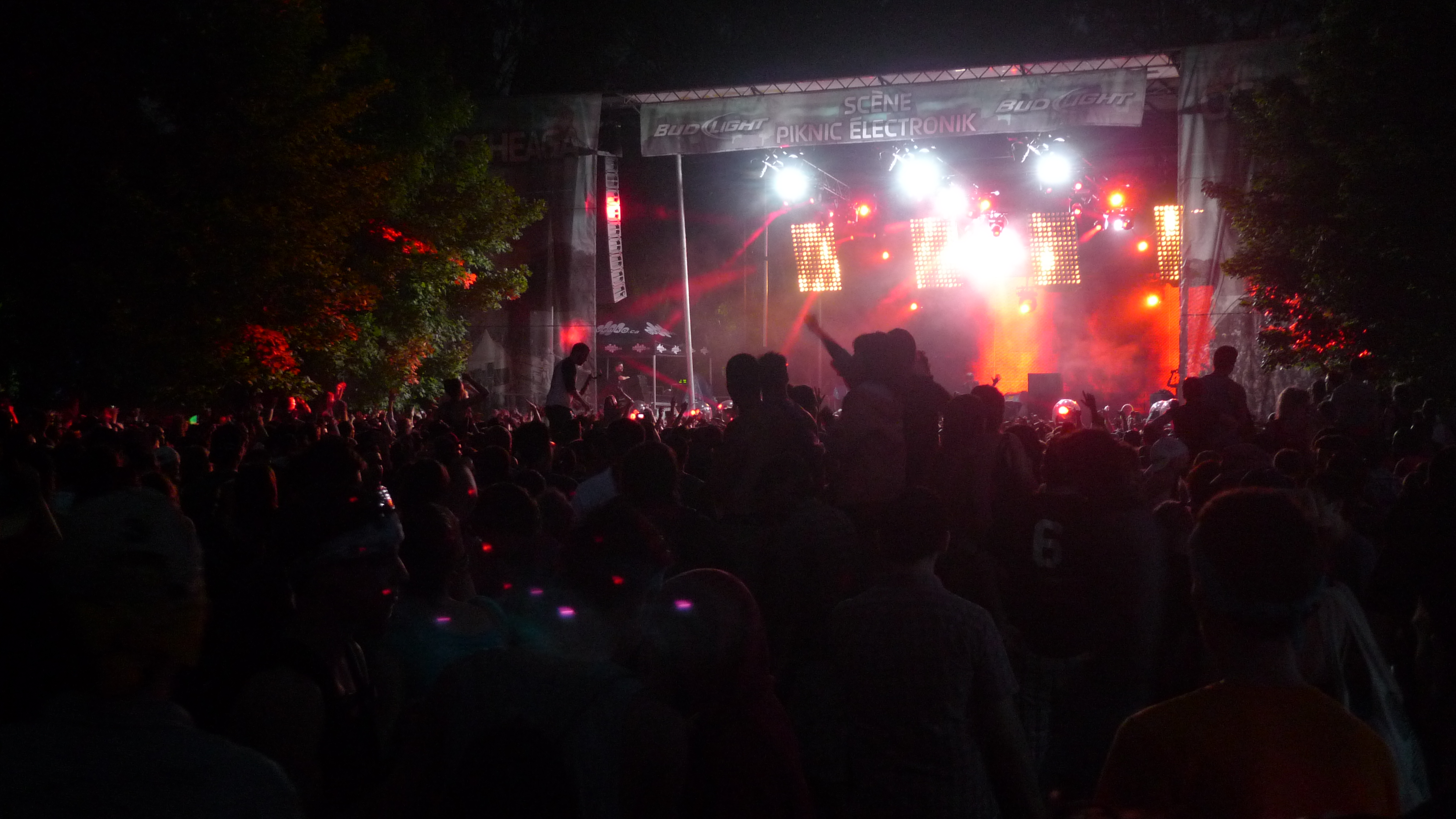 Wolfgang Gartner | Osheaga 2012